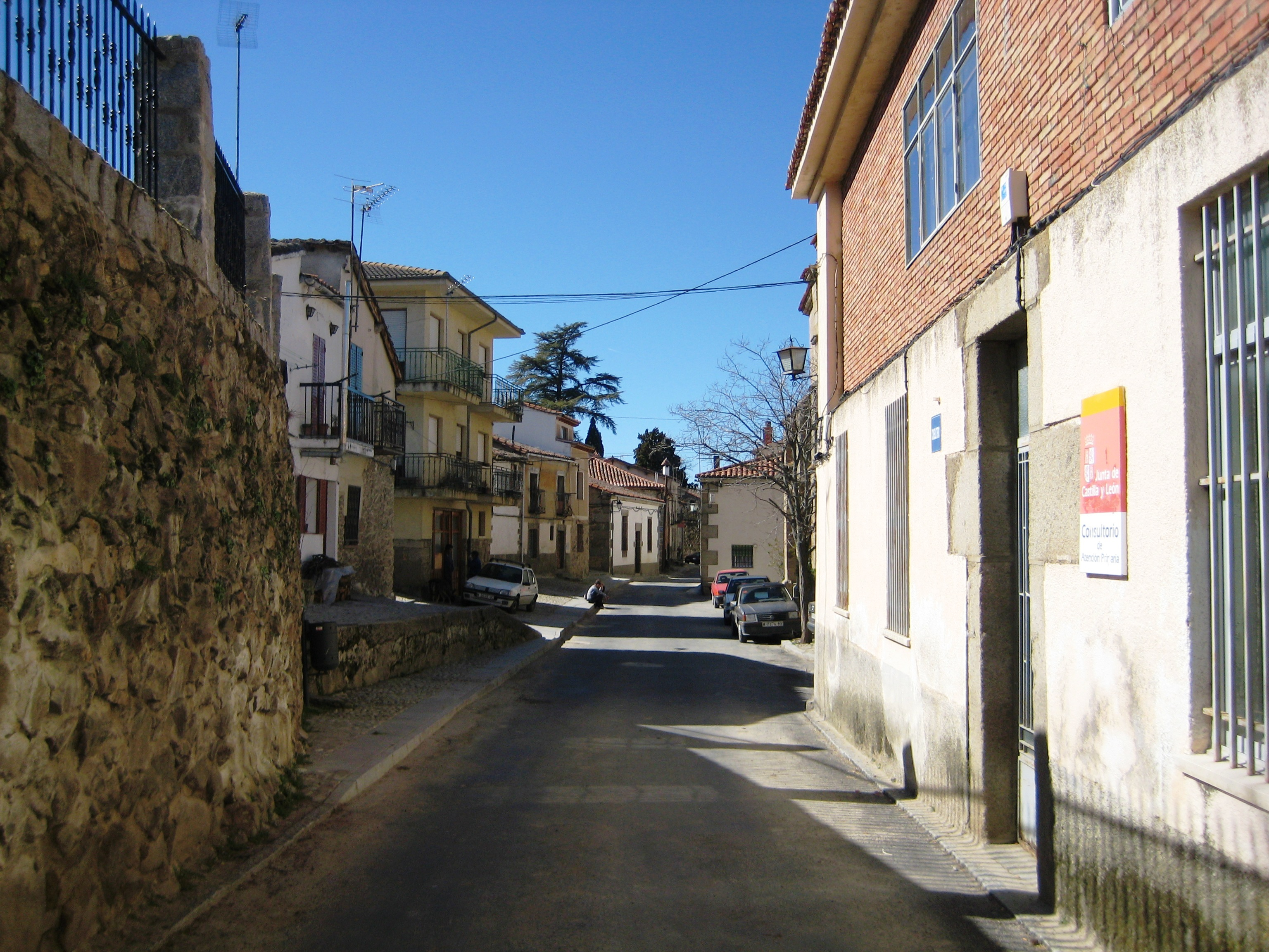 C/ CALVO SOTELO. VILLAFRANCA DE LA SIERRA (AVILA, ESPAÑA)